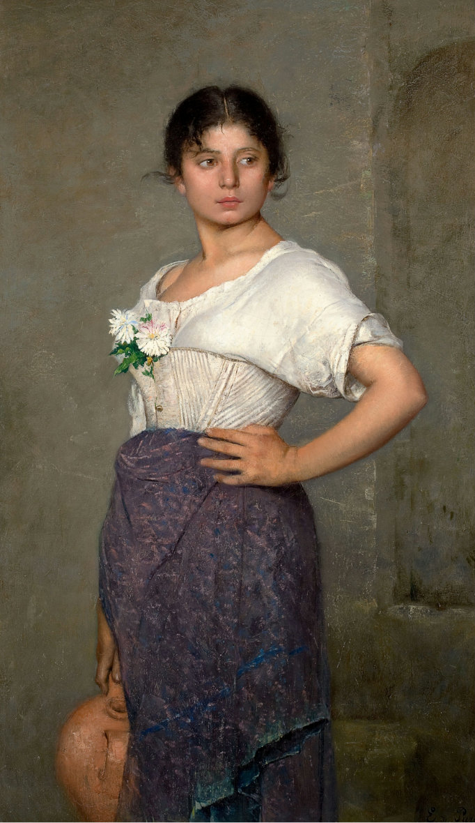 Au puits